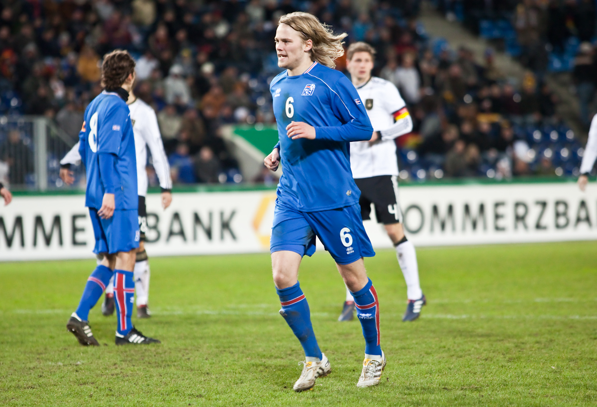 Birkir Bjarnason im U-21-Länderspiel gegen Deutschland.